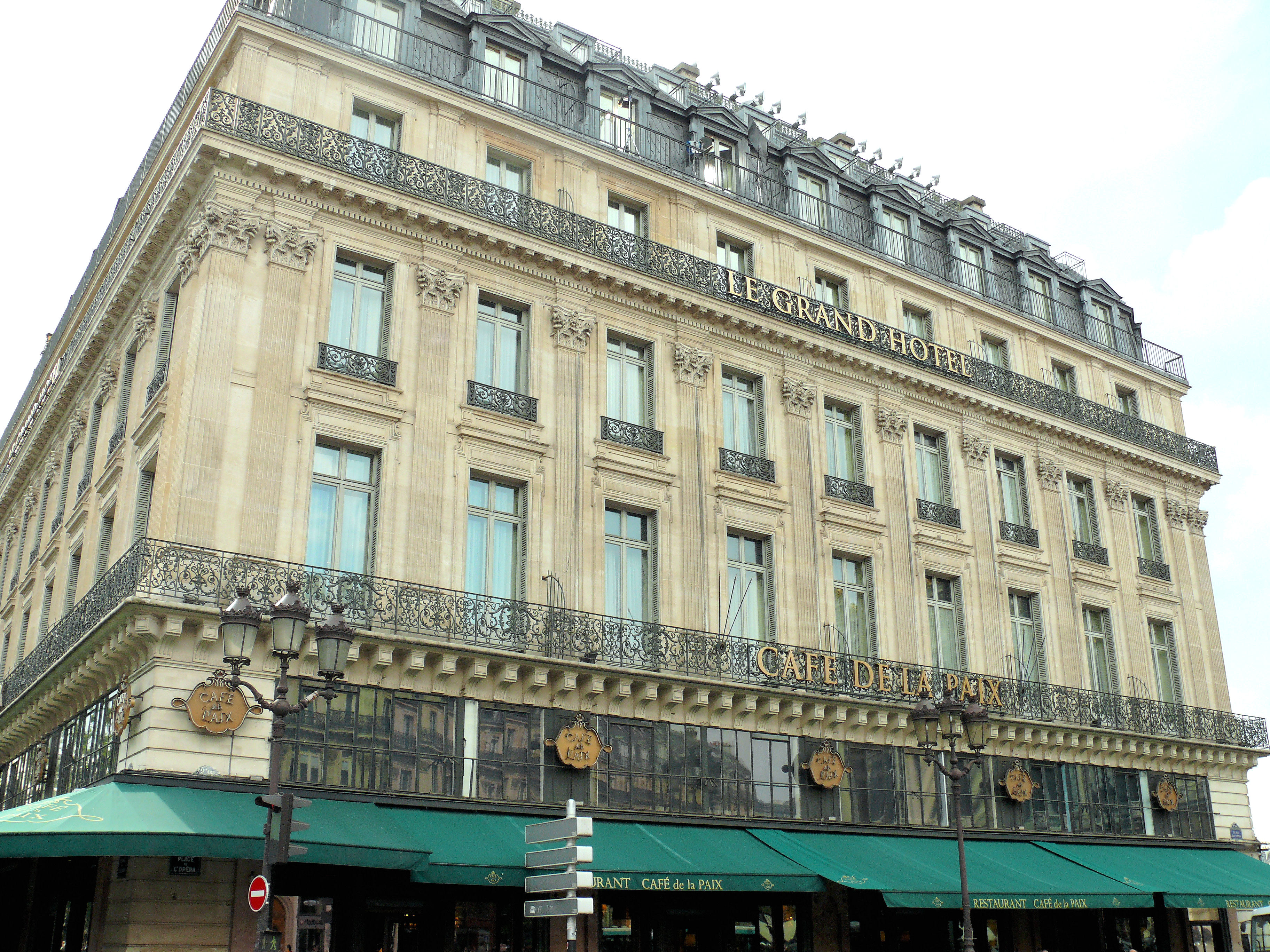 Paris 9ème arrondissement - Façade du Grand Hôtel et du Café de la Paix sur la place de l'Opéra